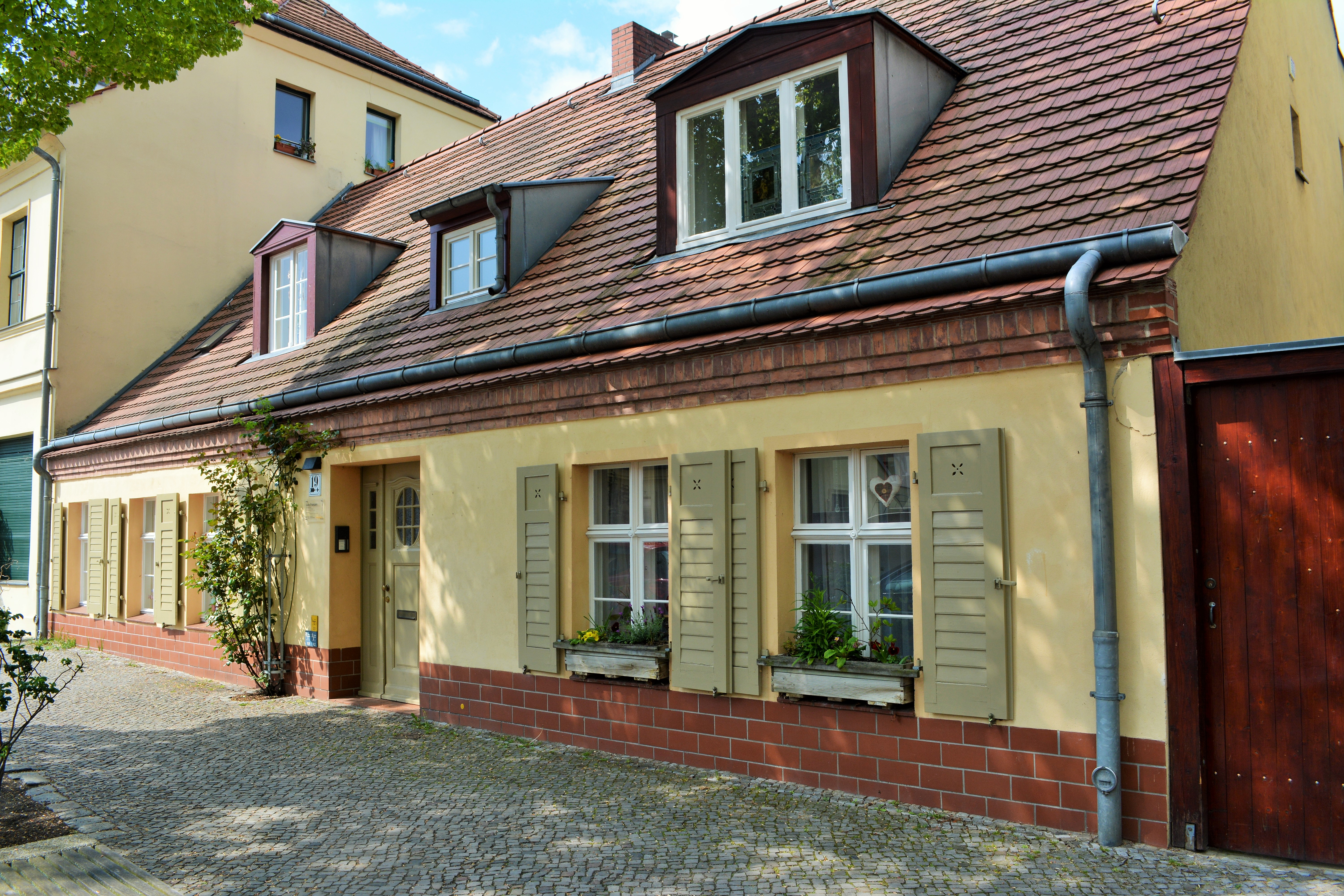 Denkmalgeschütztes Fischerhaus in Kietz Berlin-Köpenick